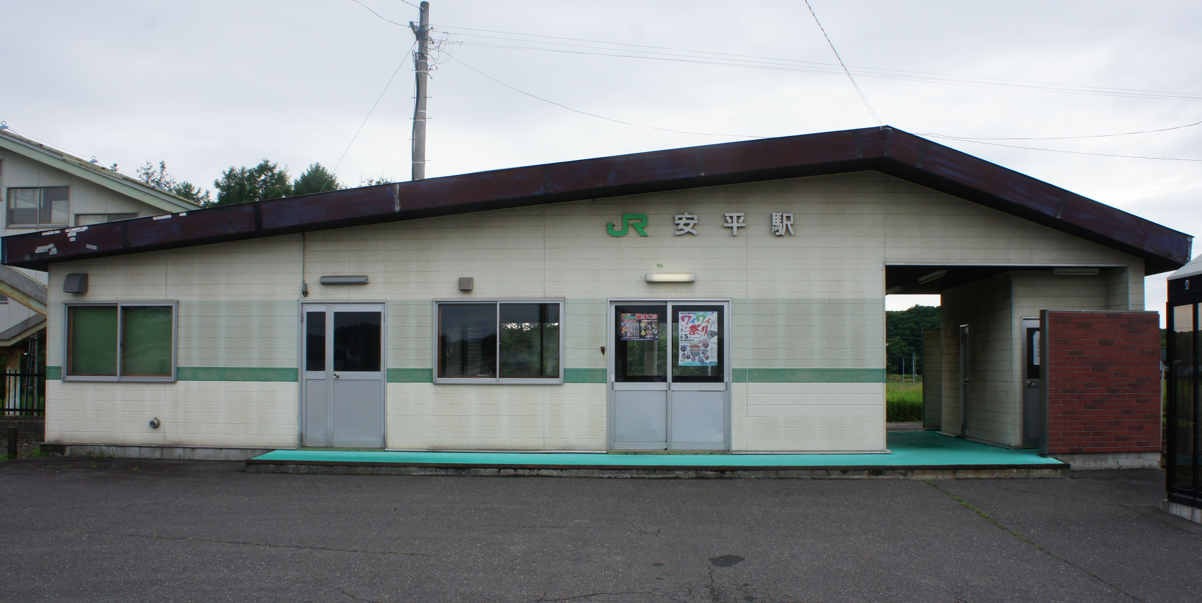 JR室蘭本線・安平駅の駅舎